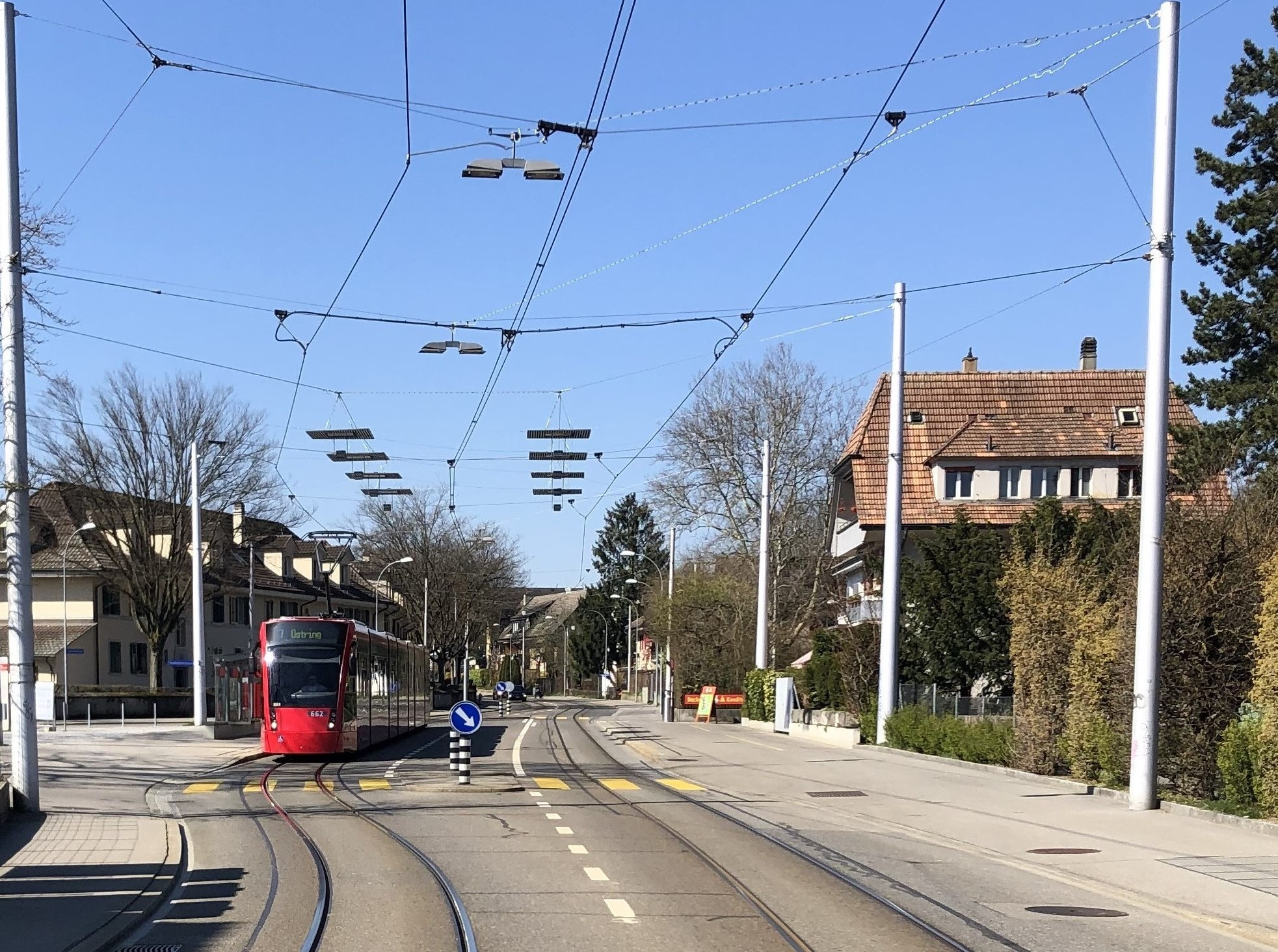 Winterhale (rechts) Haltestelle Statthalterstrasse